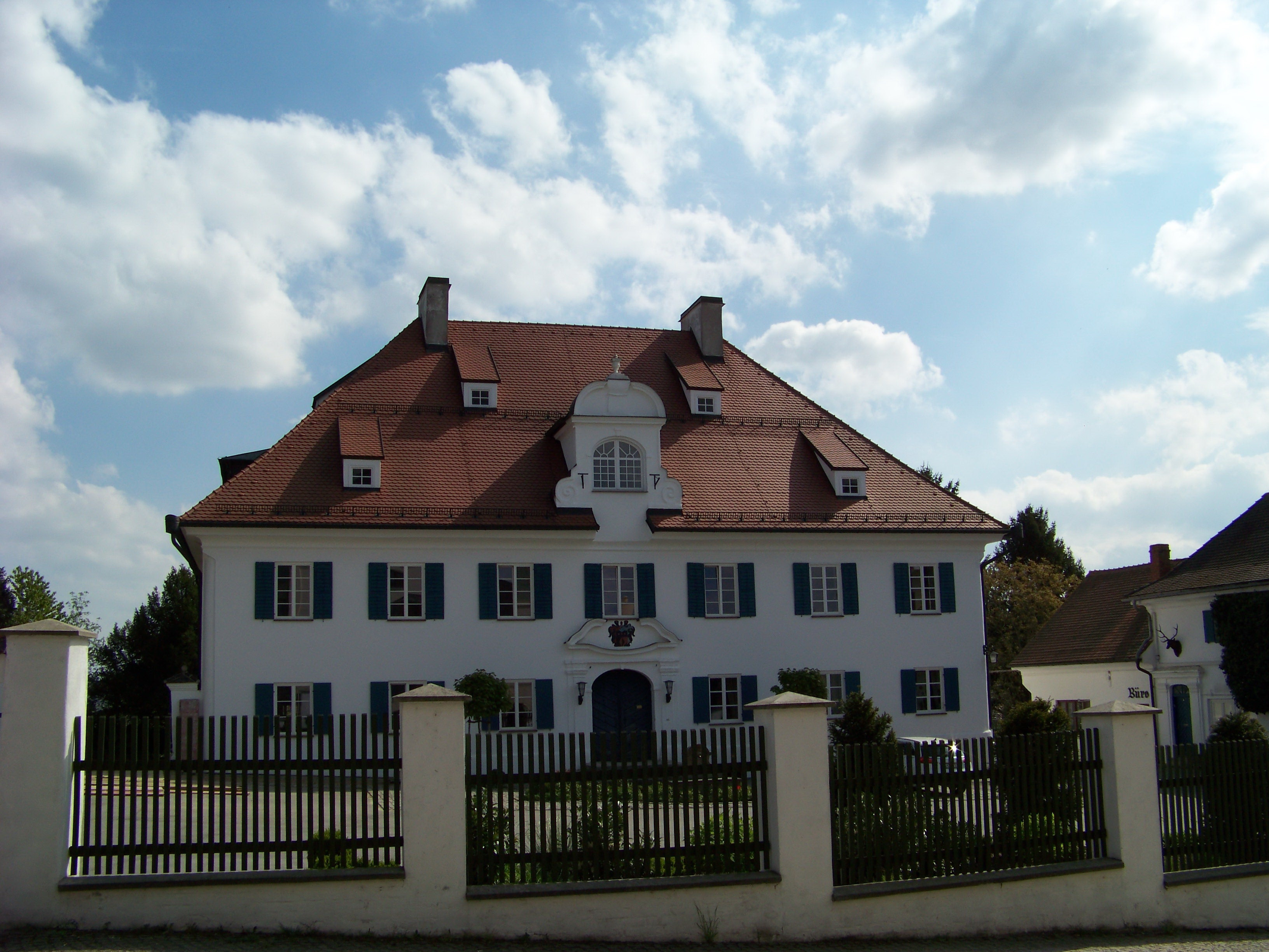 Hohenthann, Bauhausstraße 1. Schloss. Walmdachbau, 2. Hälfte 18. Jahrhundert.